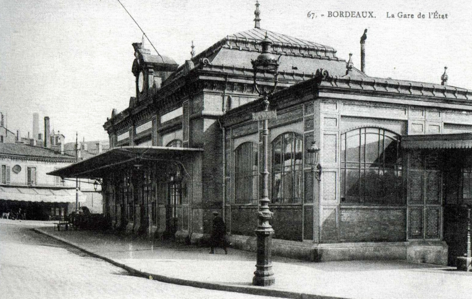 Ancienne gare de Bordeaux-État (actuelle caserne des pompiers de la Benauge)